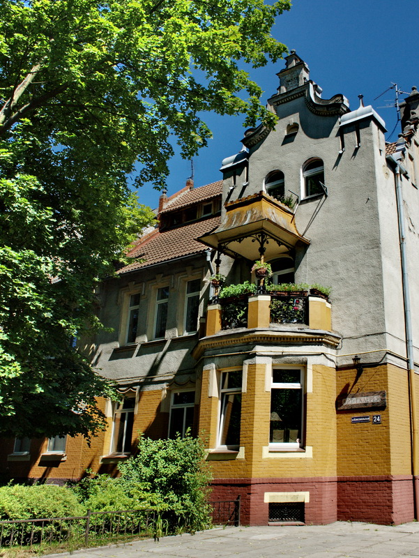 ul. Komsomolskaya (Luisenallee)